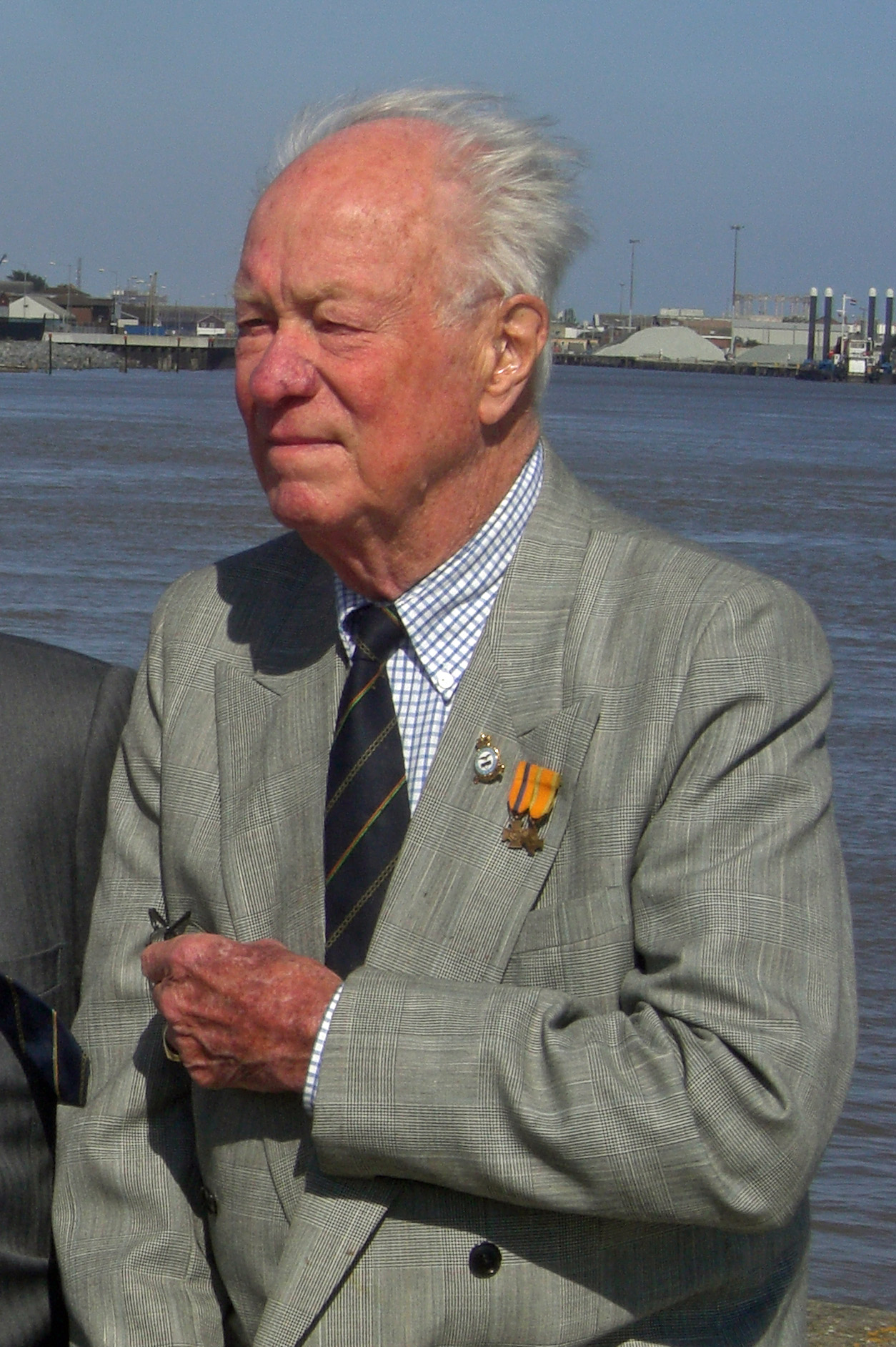 Flip Winckel , Engelandvaarder, bij herdenking in Engeland, 2007